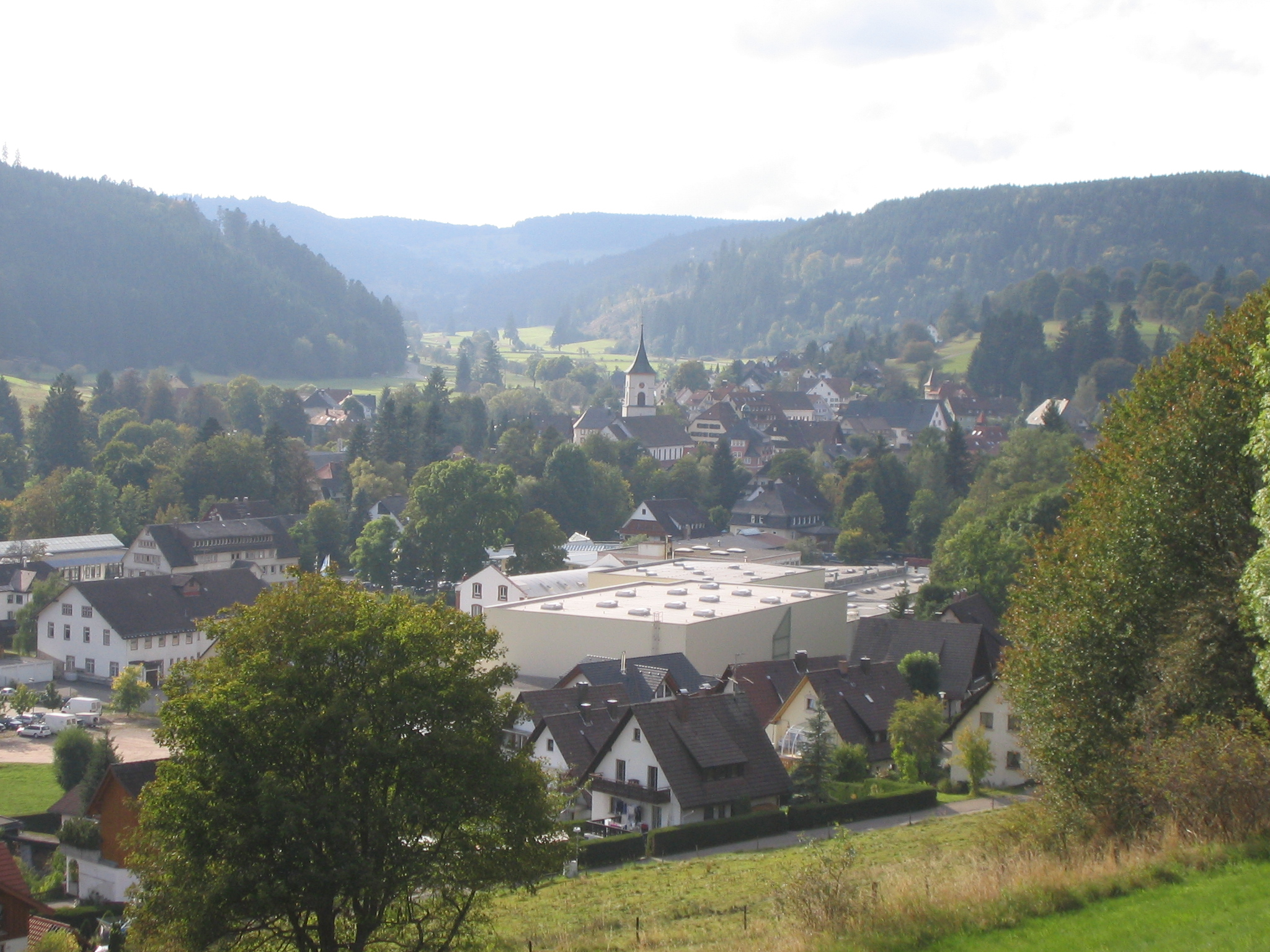 Lenzkirch von der Straße nach Titisee-Neustadt aus gesehen